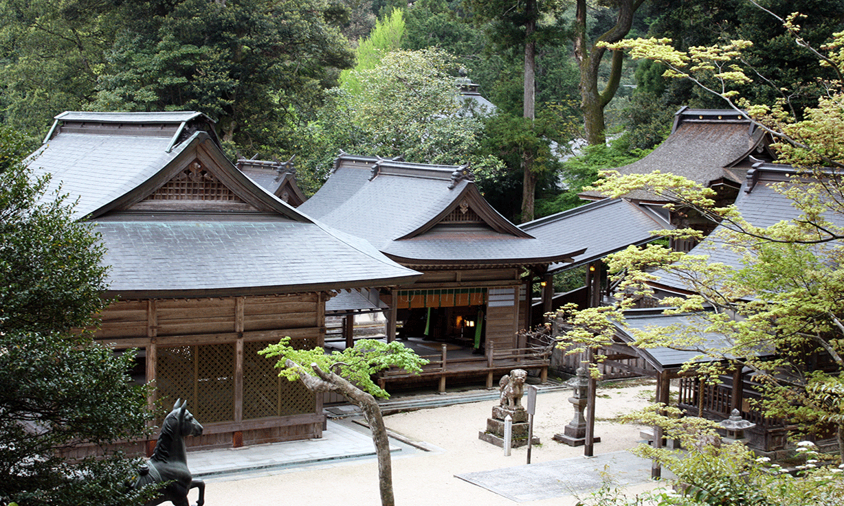 山王宮日吉神社神域を山神社石段より撮影